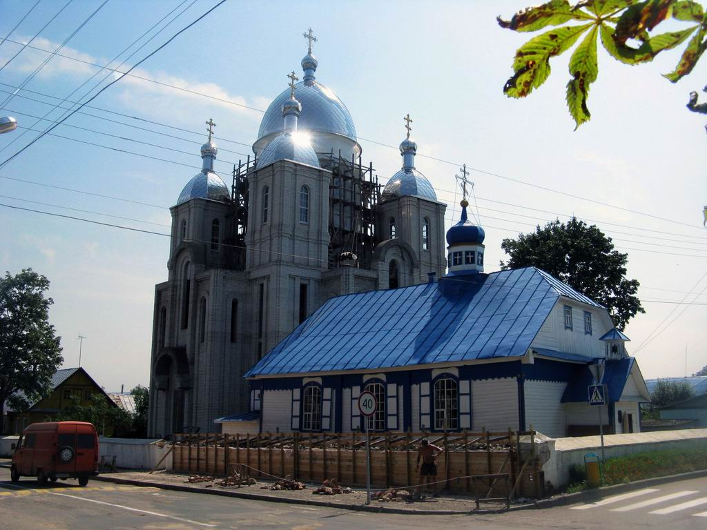 Беларуская (тарашкевіца): Зьдзецел